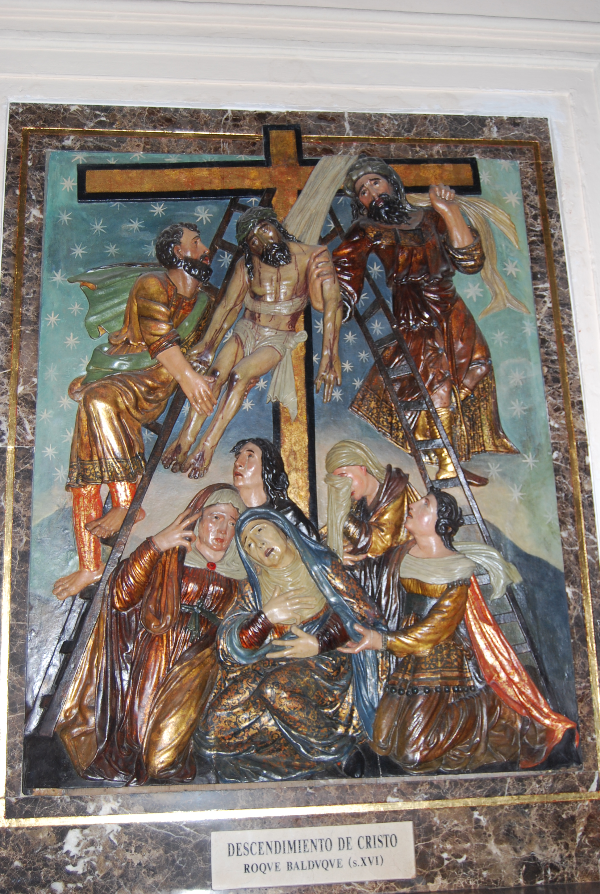 Resto del retablo.Descendimiento de la cruz.SXVI.Iglesia S. Juan Bautista.Chiclana.Cádiz.España. Pala de altare.